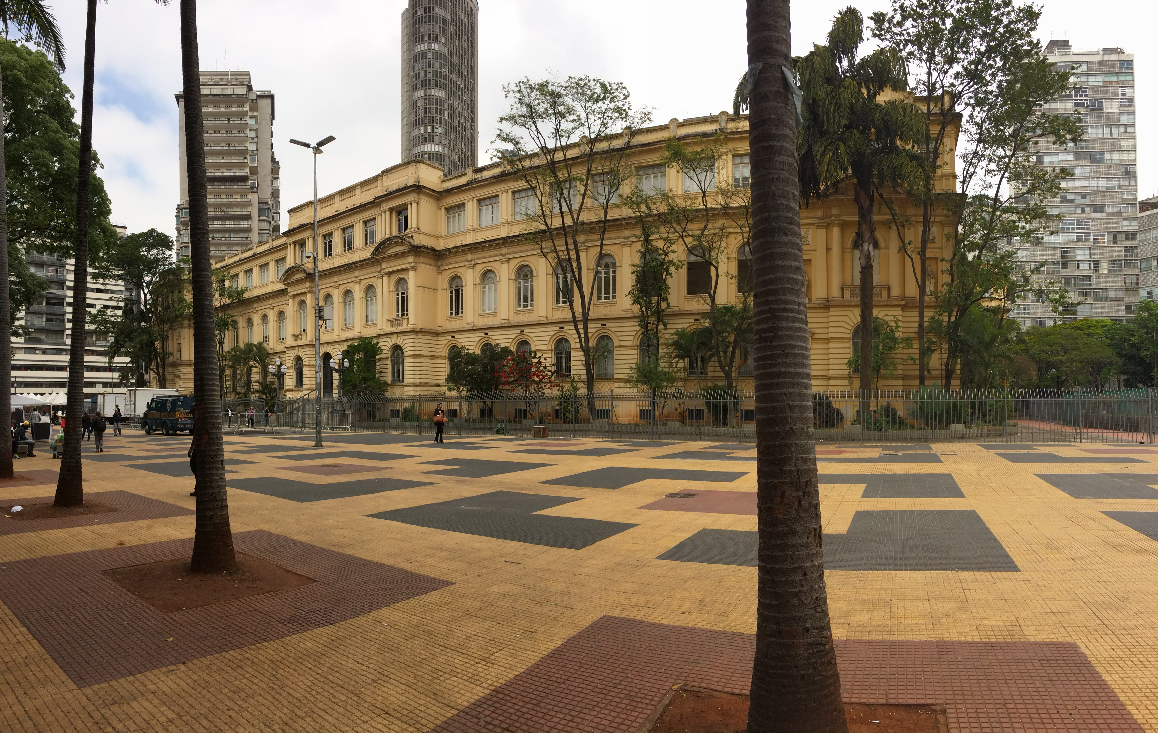 Detalhe da fachada do prédio da Casa Caetano de Campos e da Praça da República, em São Paulo (SP)